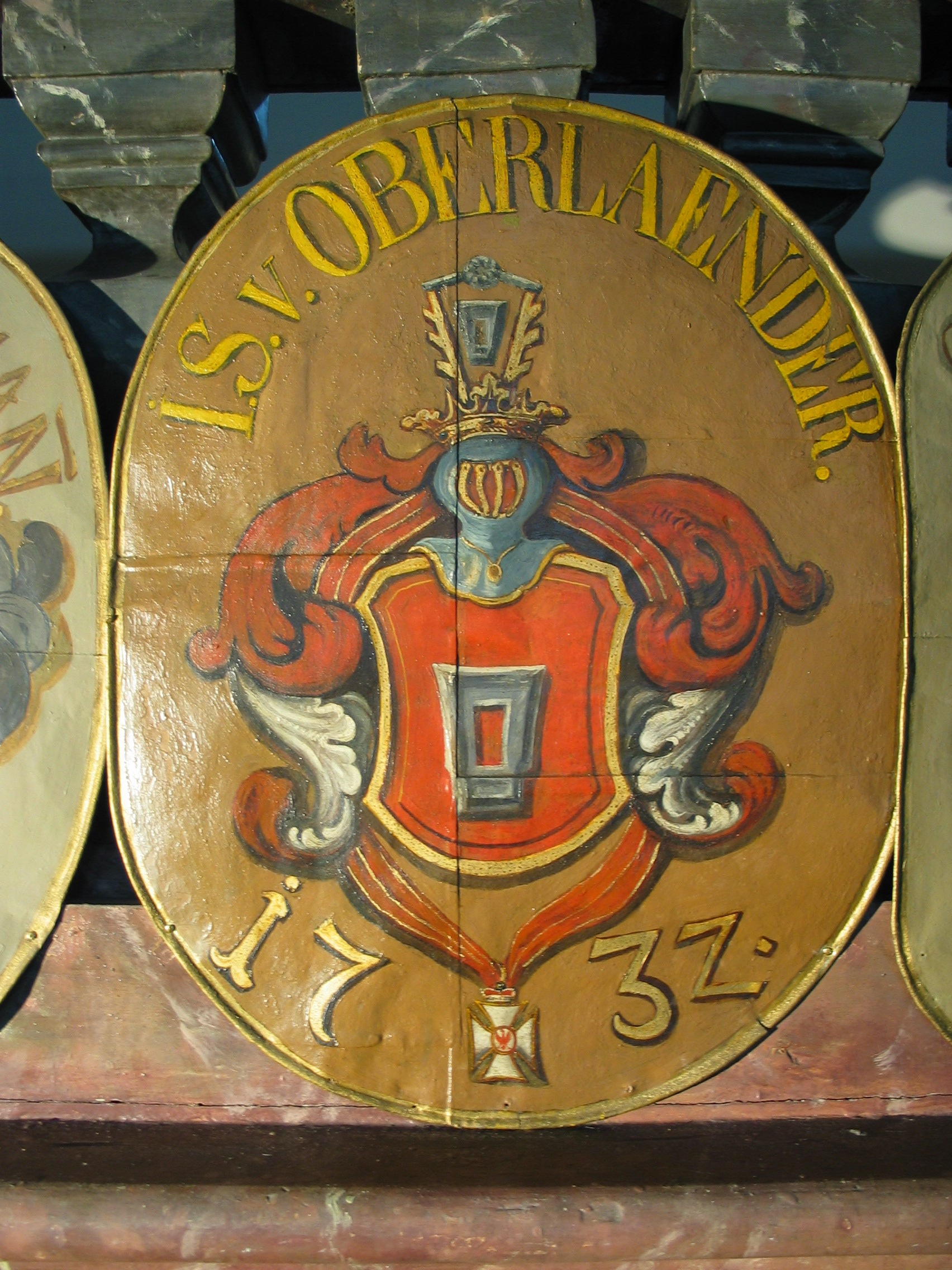 Ordensschild der von Oberländer im Roten Adler Orden, Standort: Ordenskirche in St. Georgen (Bayreuth)